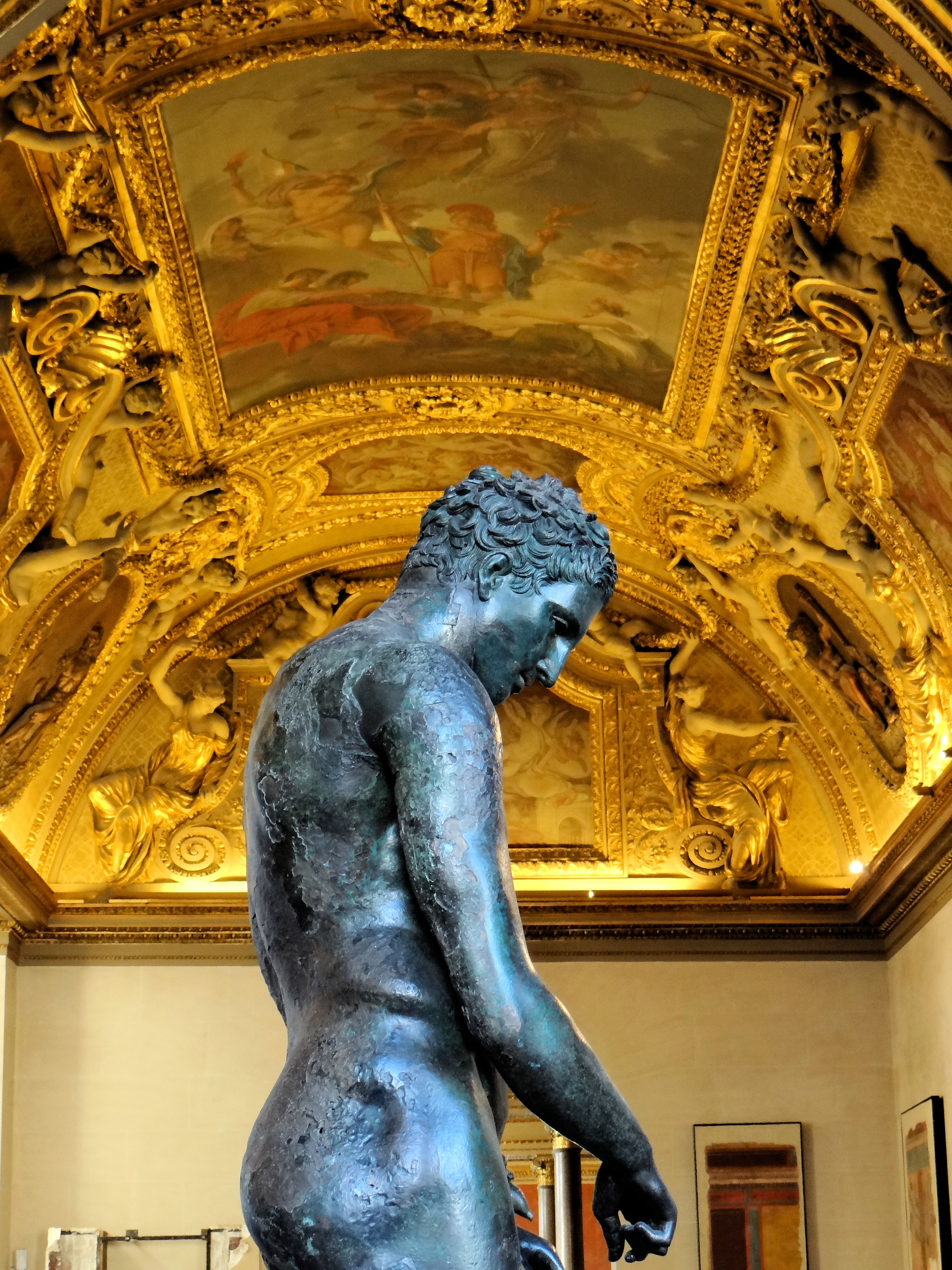 Apoxyomène de Croatie exposé au musée du Louvre